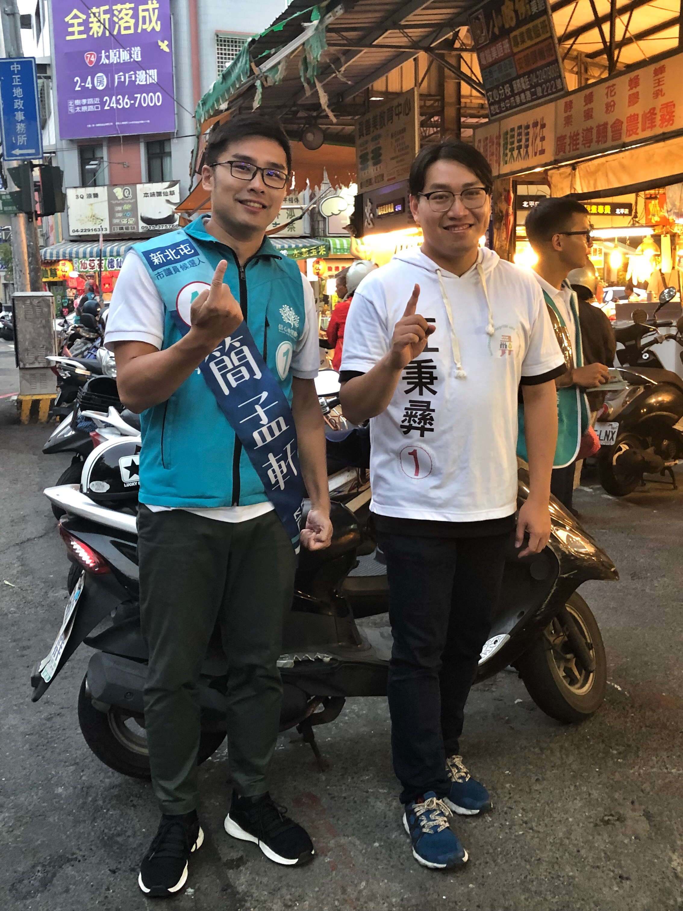 江秉彝與簡孟軒聯合拜票